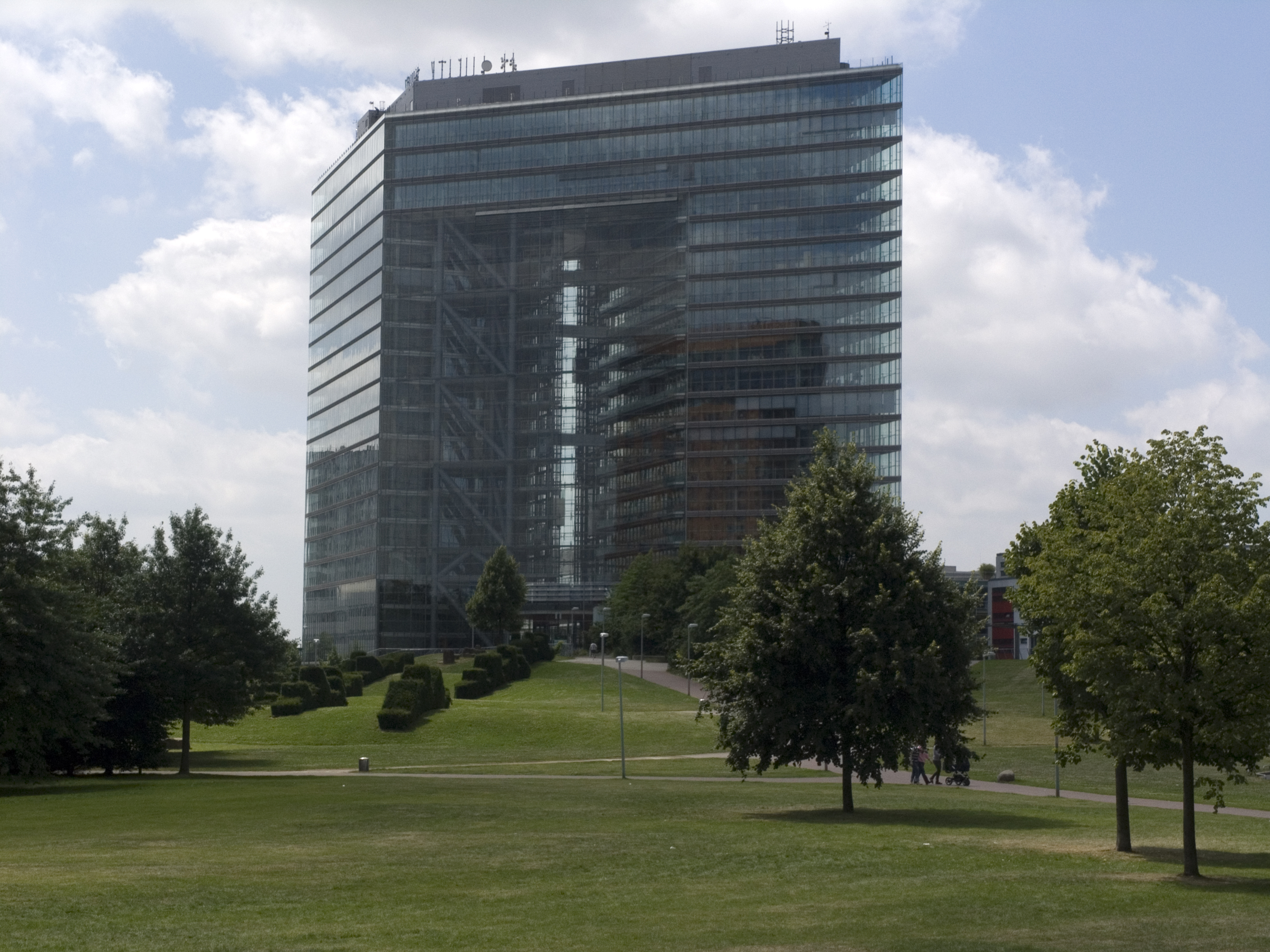 Северный Рейн-Вестфалия, Дюссельдорф. "Городские ворота"